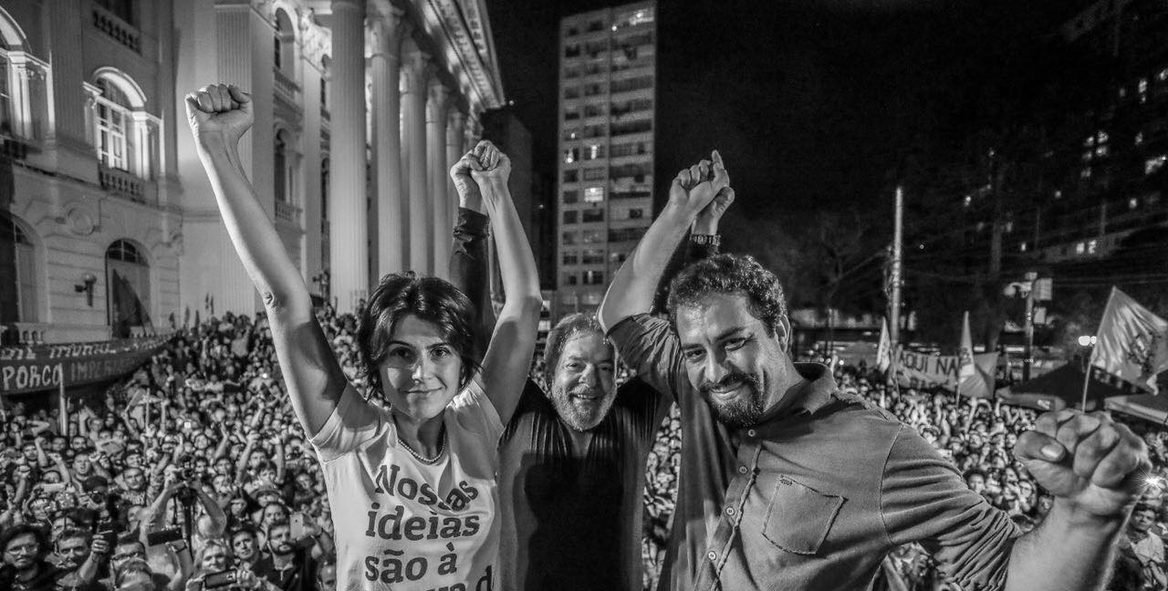 Manuela D'Ávila, Lula e Guilherme Boulos em ato contra a prisão do ex-presidente em Curitiba, no dia do fim da caravana petista pelo Sul.